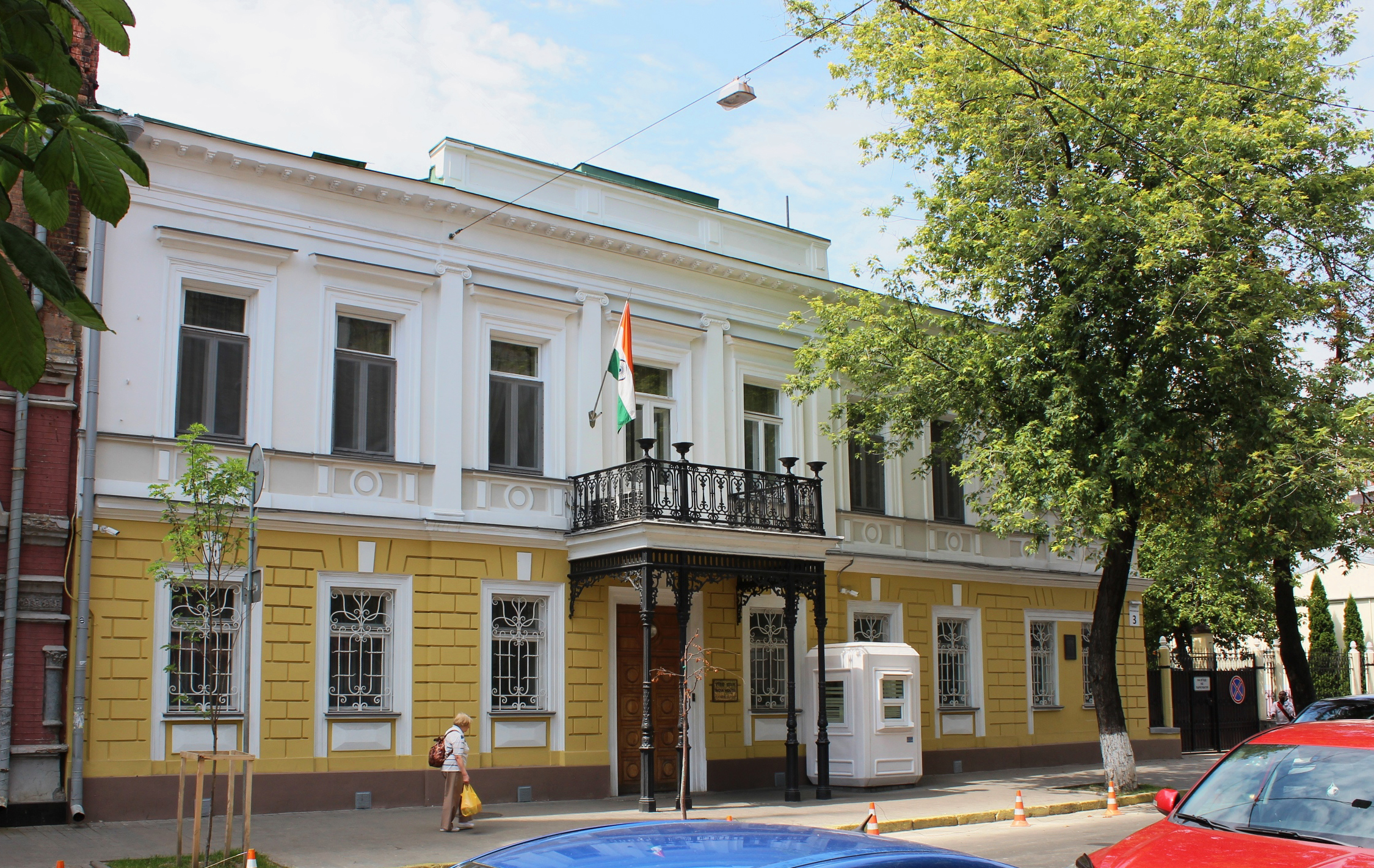 1858; 1878–1879 (реконструкція); 1885–1891 (прибудова); 1950-ті; 1980-ті